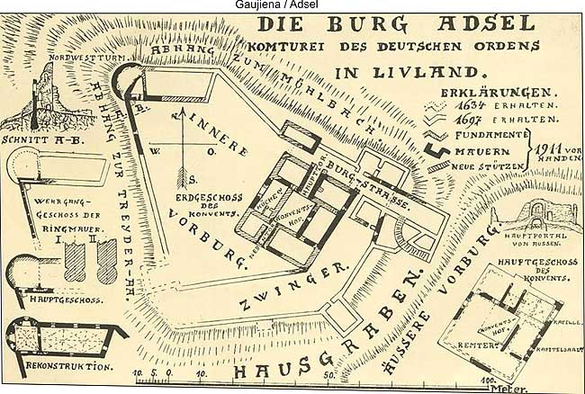 Karl Löwis of Menari rekonstruktsioonjoonis linnusest, 1911 a.